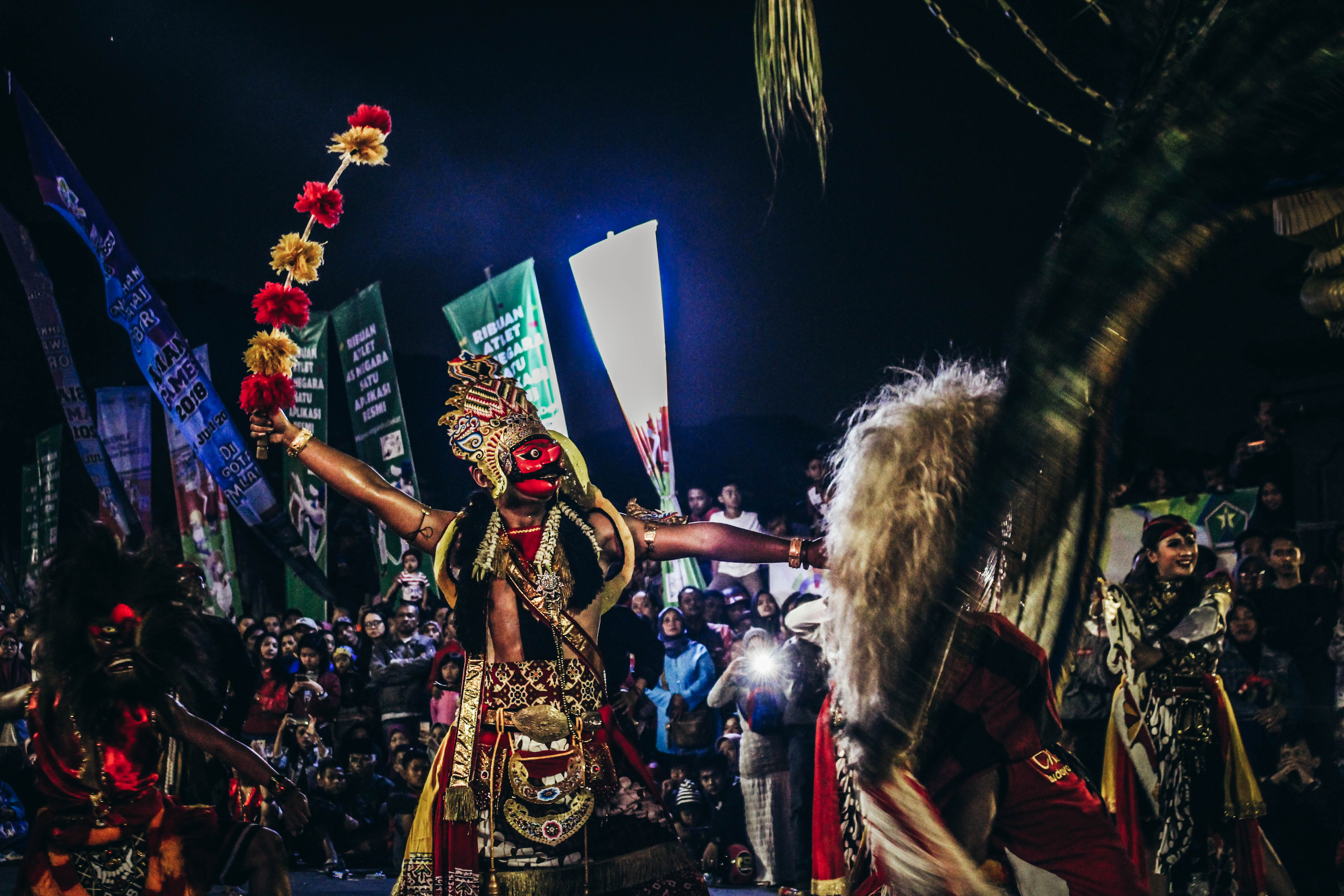 penampilan reog pada acara pawai obor yang diadakan di balaikota malang beberapa saat lalu. adegan ini merupakan serangan terakhir sebelum kekalahan "pihak jahat"